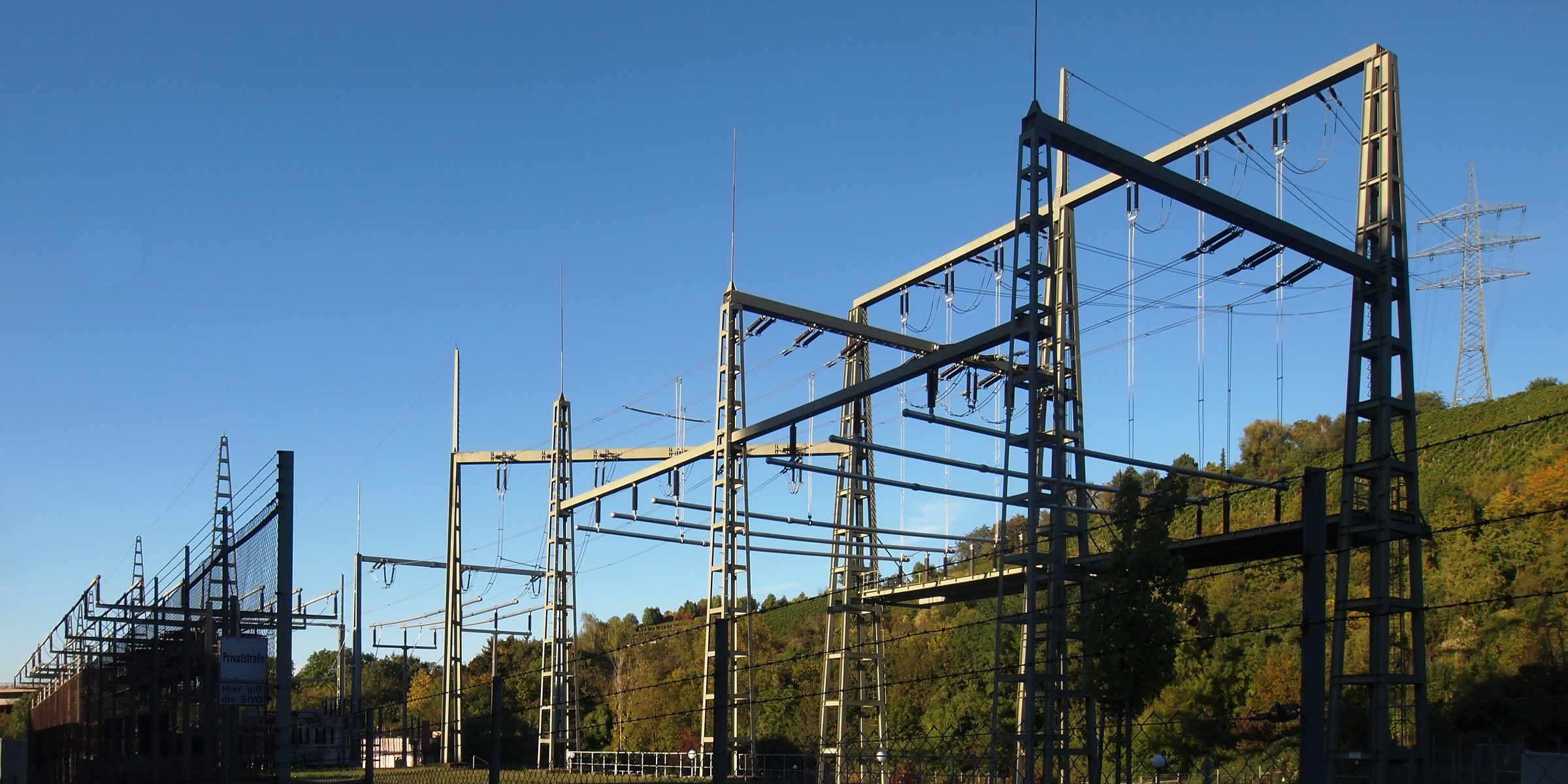 Das ehemalige 220kV/110kV-Umspannwerk wurde zur 110kV-Schaltanlage degradiert. Rechts die Zuleitung, links die wegführenden Schaltfelder.